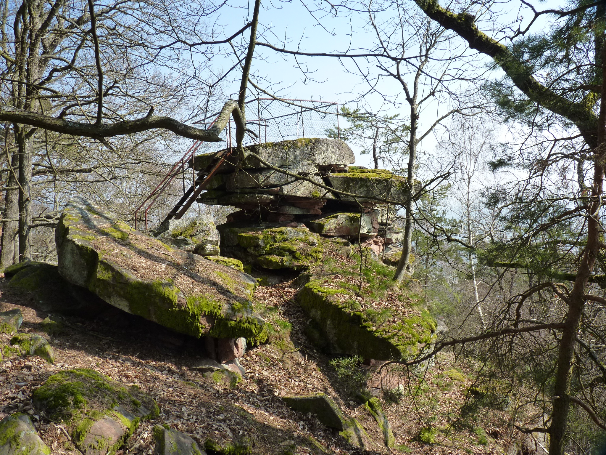 Hambacher Bergstein im April 2015